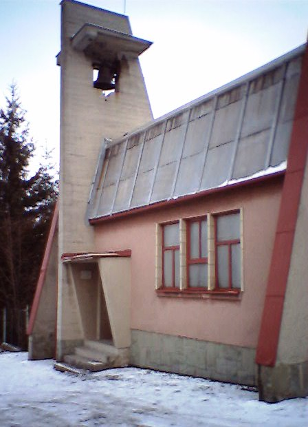 Lutheran Chapel in Střítež (Trzycież, Trzytiesch), Czech Republic